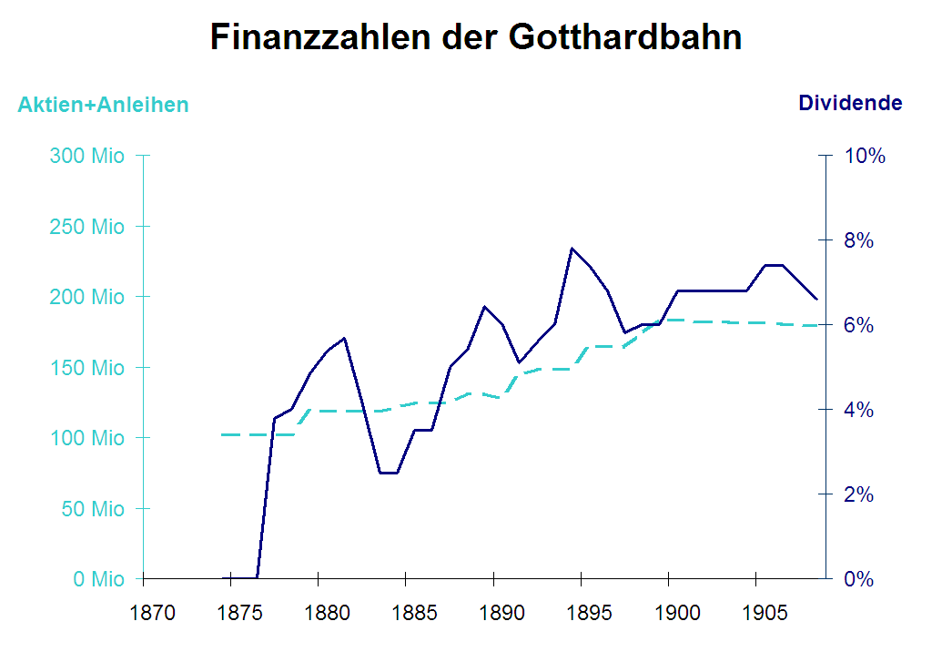 Aktienkapital und feste Anleihen sowie Dividende Aktien sind Anteile am Grundkapital des als Aktiengesellschaft konstituierten Bahnunternehmens. Sie sind hier im Nennwert angegeben, der jedoch in keiner Weise dem Kurswert entsprechen muss. Viele Bahnen haben im Laufe der Zeit ihr Aktienkapital erhöht, was gewöhnlich auf eine Expansion der Bahn hindeutet. Eine Verminderung des Aktienkapitals wurde bei finanziellen Schwierigkeiten vorgenommen, indem durch Herabsetzung des Nennwerts der Aktien Kapital für das Unternehmen freigesetzt wurde (sogenannter Kapitalschnitt). Feste Anleihen waren neben Aktien die wichtigste Form der Geldbeschaffung für die Bahnen. Das vom Unternehmen aufgenommene Kapital wird über eine bestimmte Laufzeit zu einem bestimmten Zinssatz verzinst. Die Zinslast für Anleihen war ein gewichtiger Ausgabeposten insbesondere der grossen Bahnen. Wenn wegen zu geringen Erträgen die Zinsen nicht mehr bezahlt werden können, droht der Konkurs. Die Dividendenauszahlungen für die Aktionäre sind hier im Verhältnis zum Nennwert der Aktien angegeben.